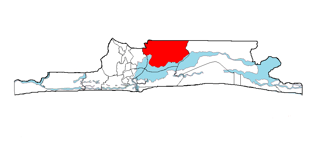 Ubicación de Ikorodu en el Estado de Lagos